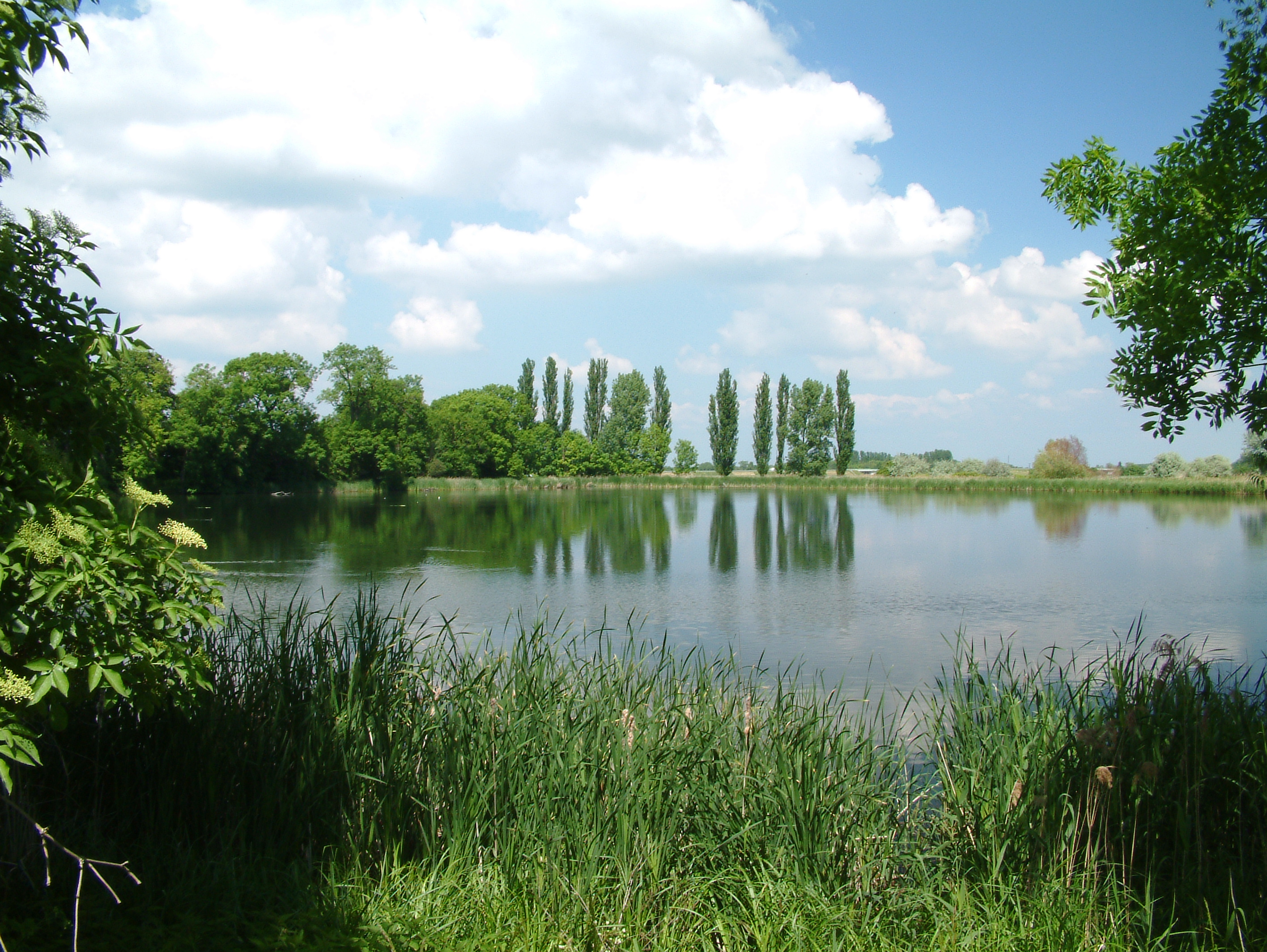 Der Luttersee, im Volksmund kurz "Lutter" genannt, hieß in früheren Zeiten auch die "Offenbare See". Er ist ca. 5 m tief.